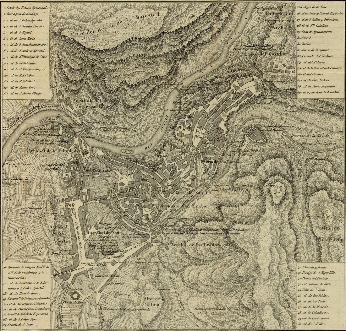 Plano de Cuenca en 1850, extraído del pliego de la provincia de Cuenca del "Atlas de España y sus posesiones de ultramar".